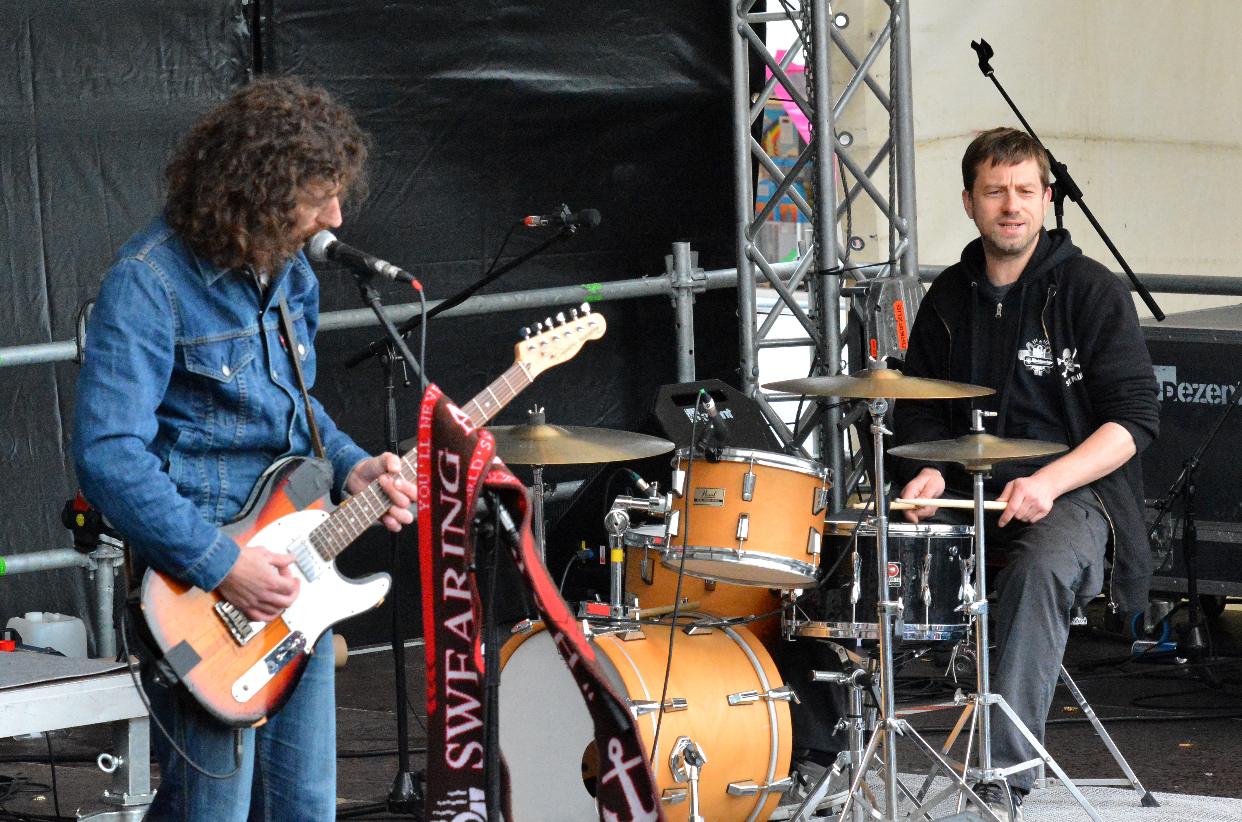 Swearing at Motorists beim 825. Hamburger Hafengeburtstag 2014 am 11. Mai 2014